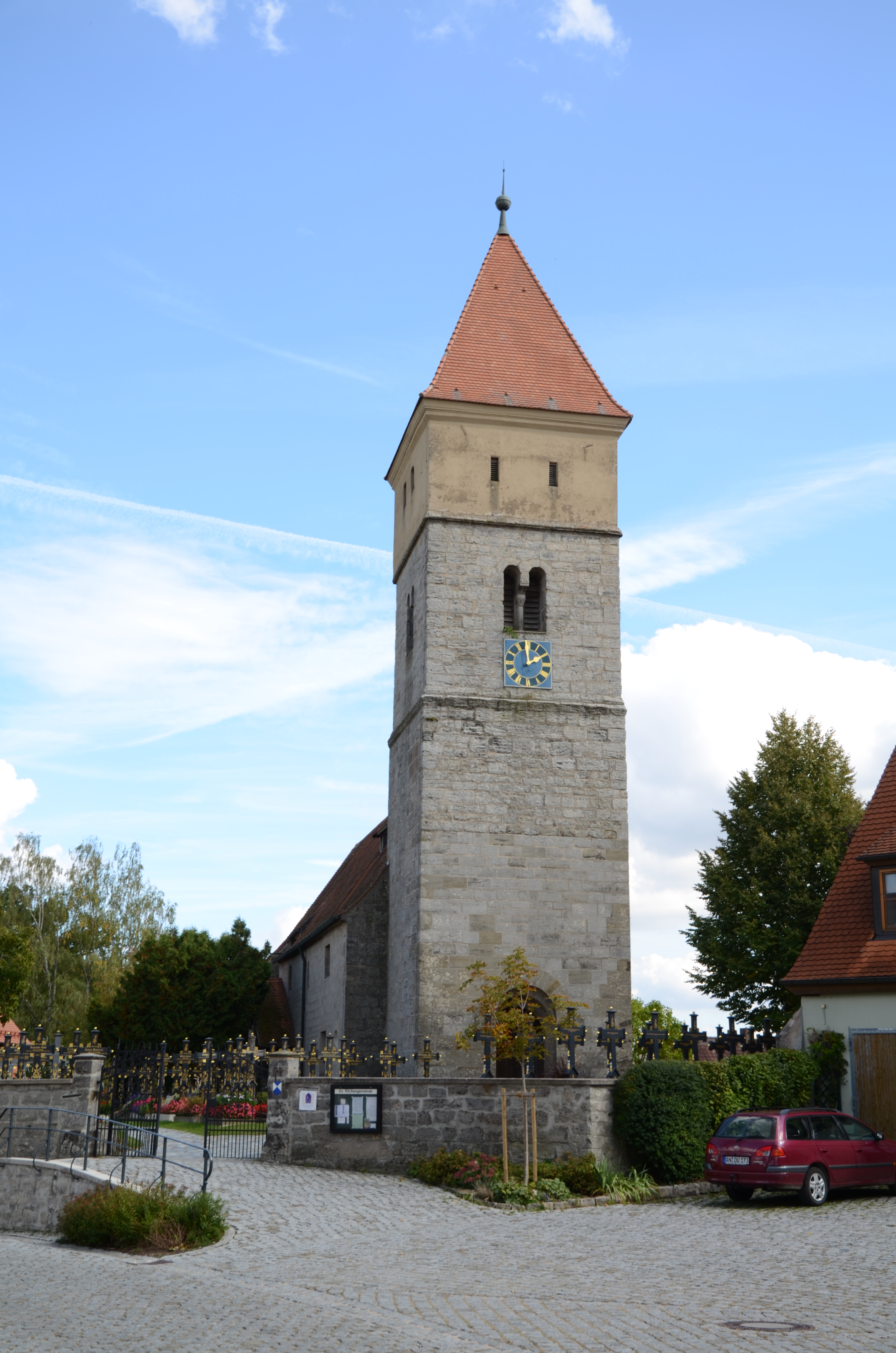 Dinkelsbühl Ostseite des Weinmarkts Dinkelsbühl Segringen St. Vinzenz